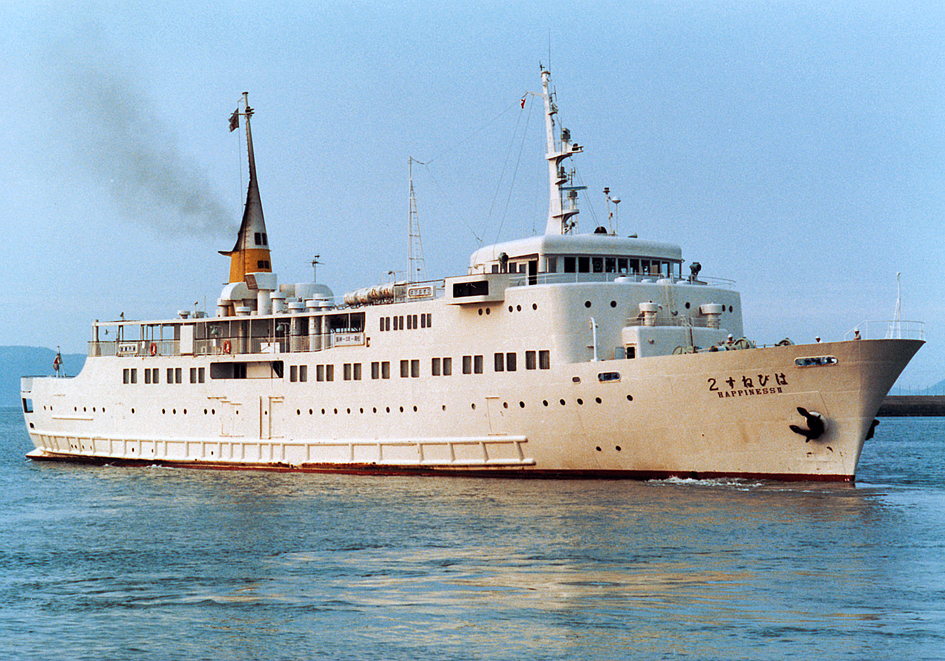 加藤汽船 大阪－高松航路 客船 はぴねす2 高松港